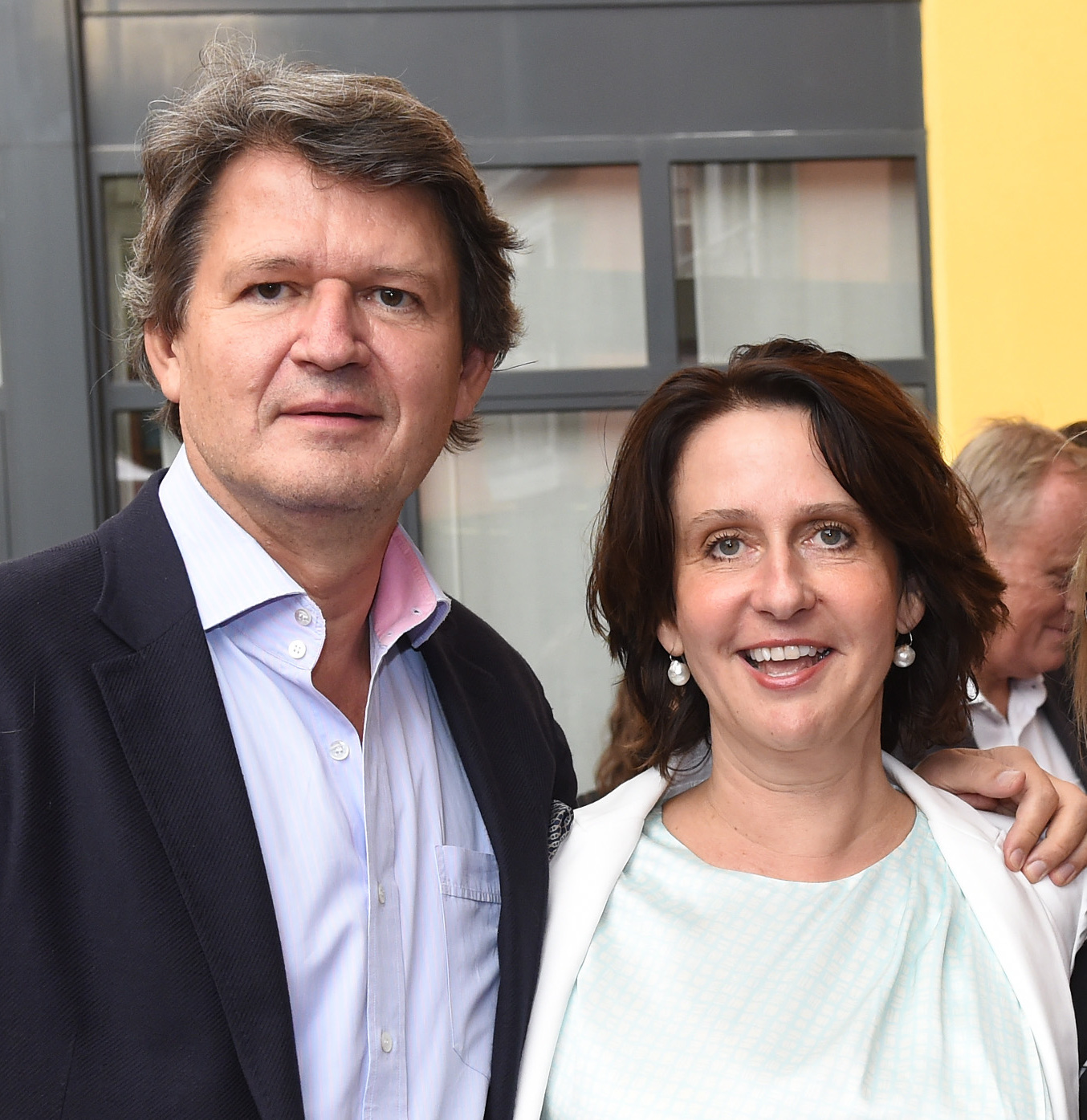 Sommerfest 2015 der SPÖ im Gartenhotel Altmannsdorf